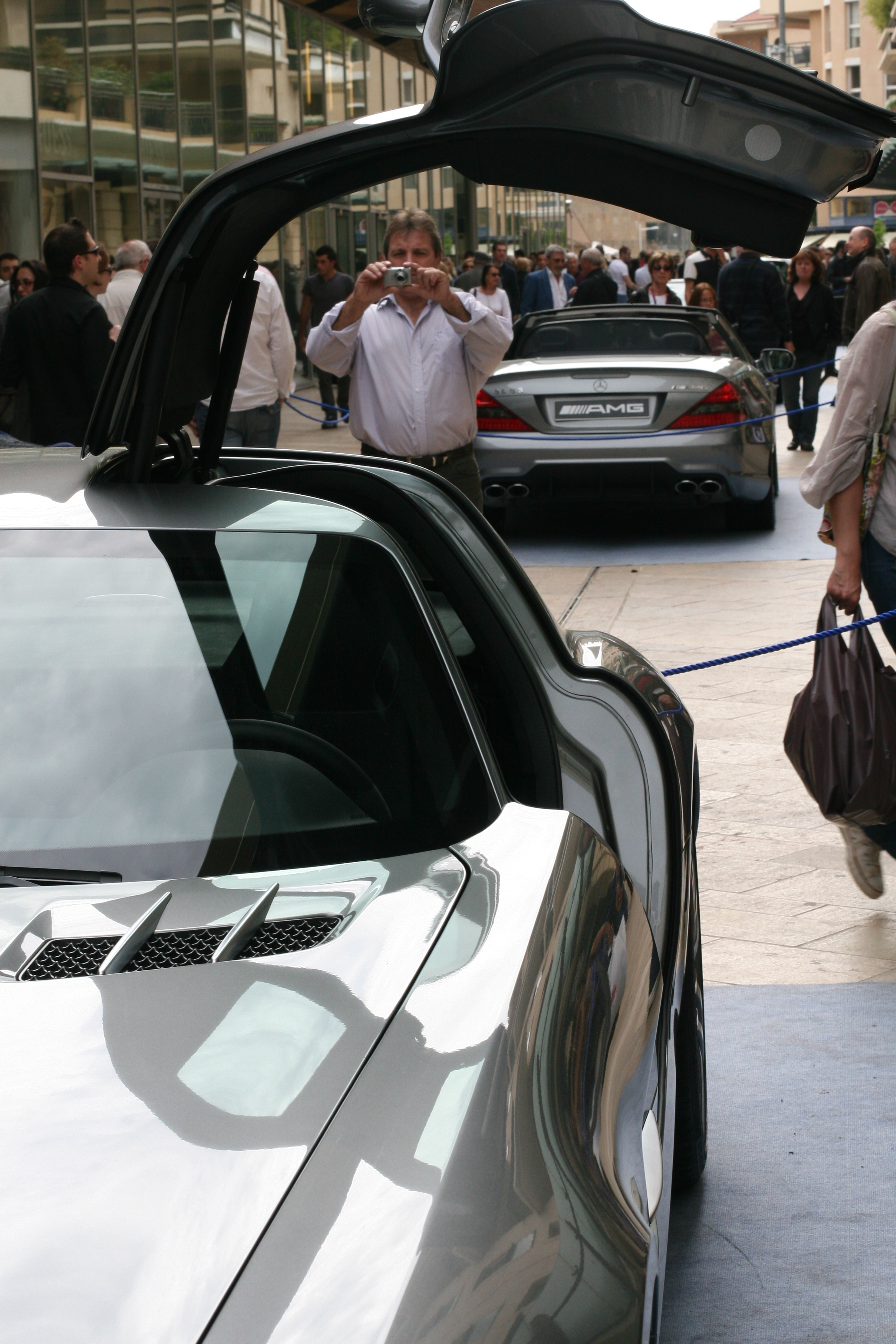 Une porte papillon de la Mercedes SLS AMG.